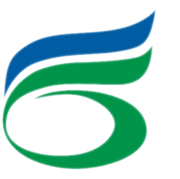 广州六中标识